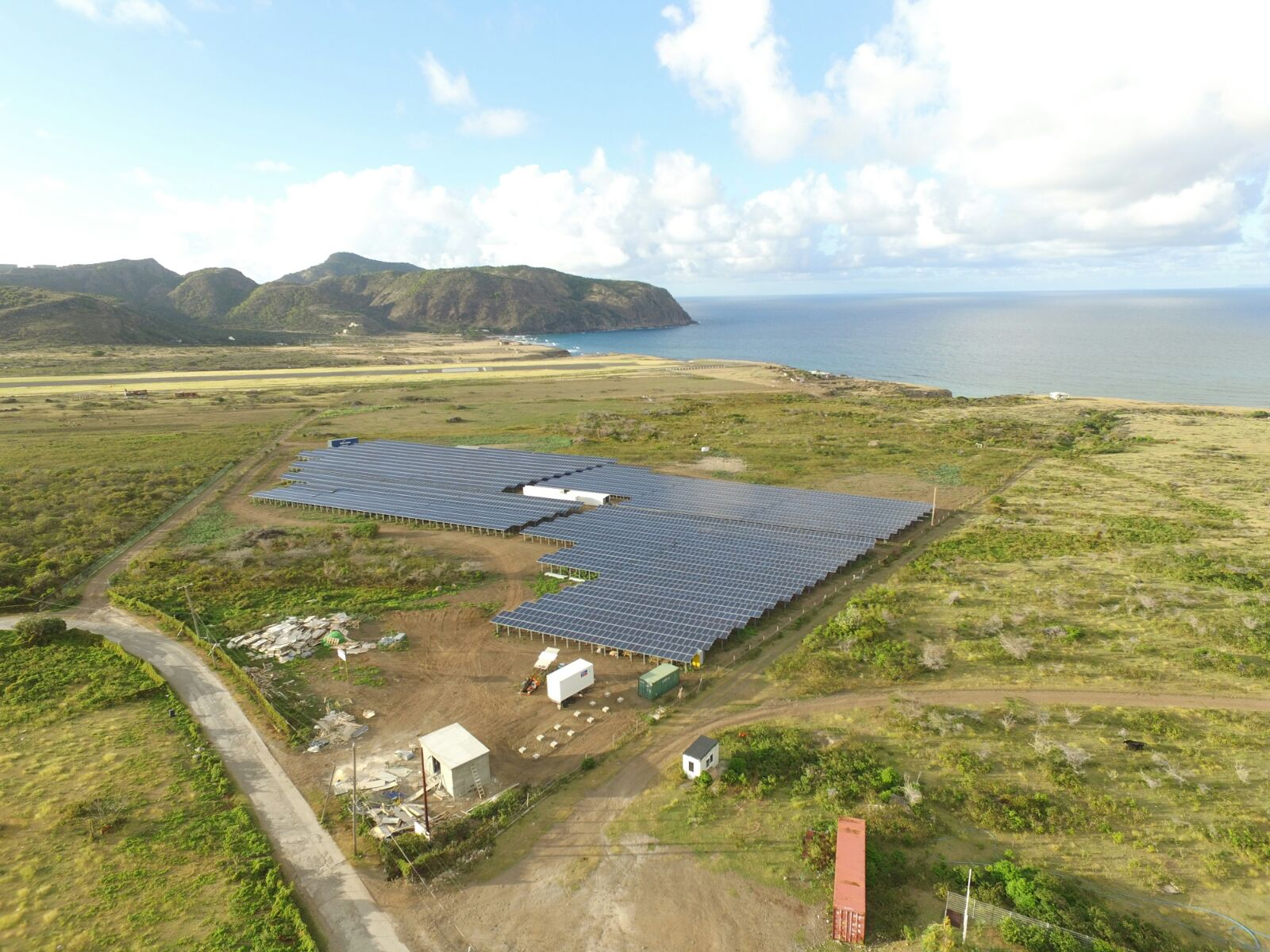 luchtfoto van de zonneweide op Sint Eustatius in 2016, rots, zee.